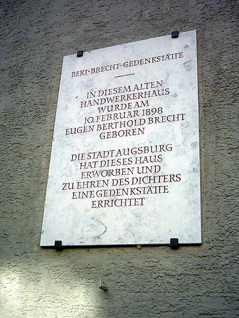 Gedenktafel am Brechthaus in Augsburg, Bayern